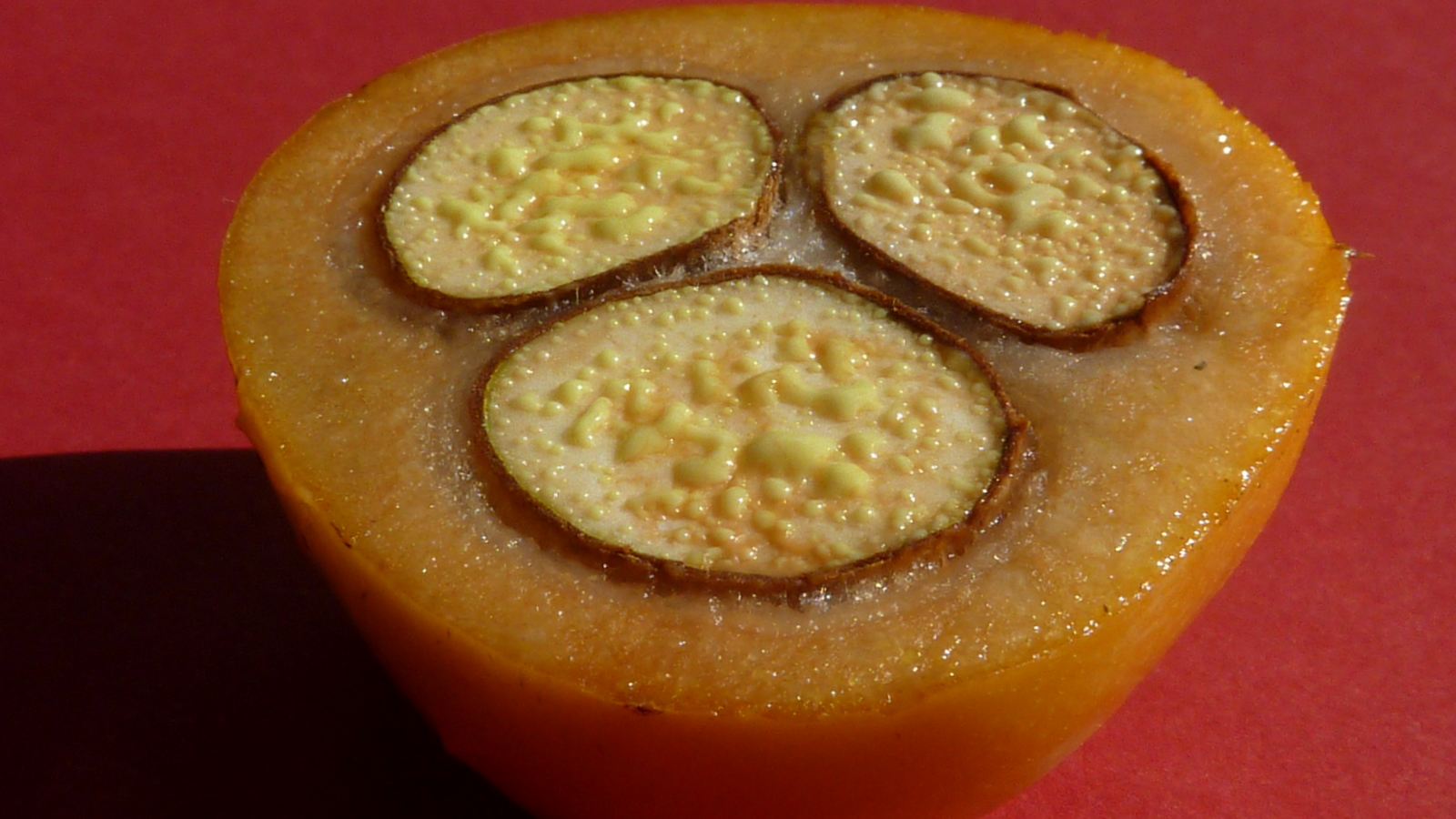 Garcinia gardneriana (Planch. & Triana) Zappi